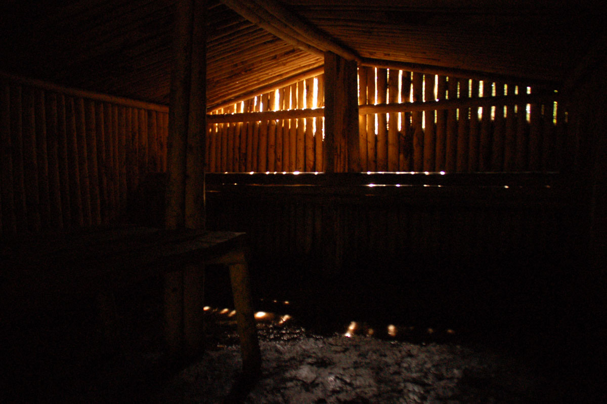 Herbouwde onderduikhut vanuit WO II, Verscholen Dorp, Vierhouten. Reconstruction dugout shelter WW2 Netherlands